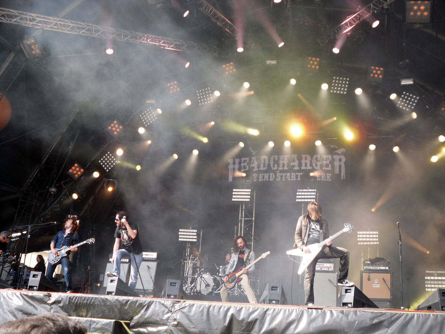 Les Caennais du groupe Headcharger sur la Mainstage 02 du Hellfest en 2011